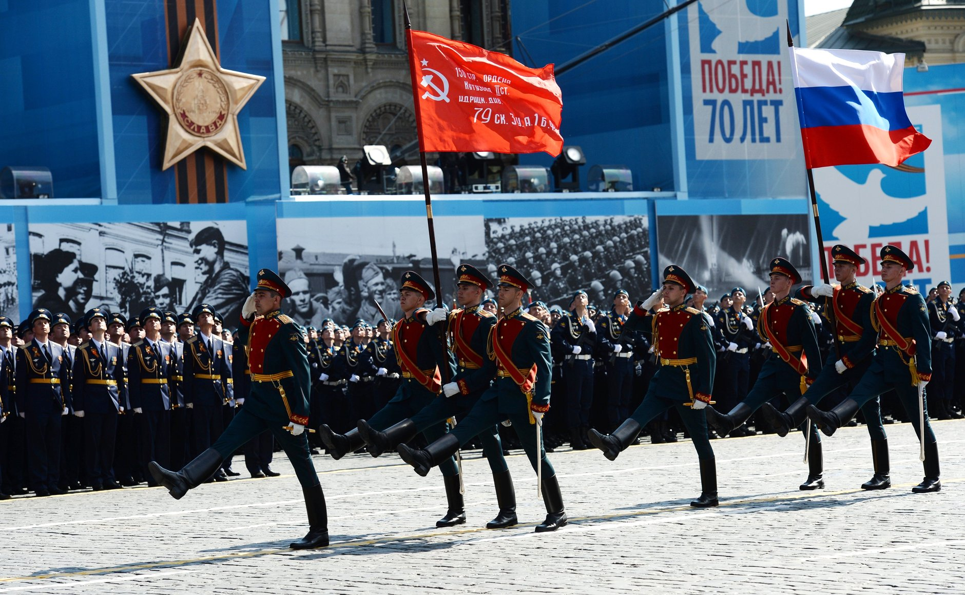 Военный парад в ознаменование 70-й годовщины Победы в Великой Отечественной войне 1941–1945 годов.